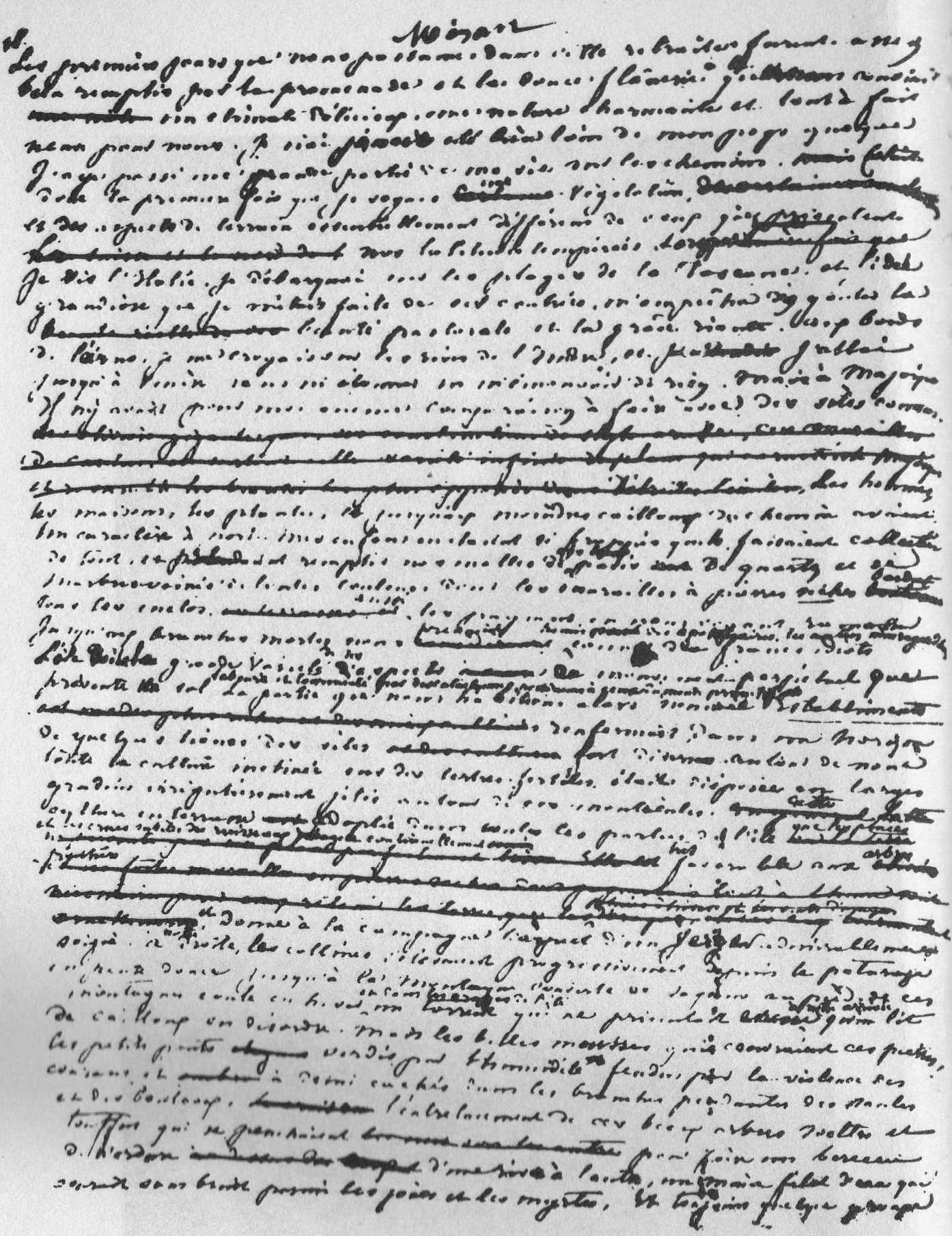 Facsímil de la obra Un hiver à Majorque (Un invierno den Mallorca) de la escritora francesa George Sand. Tomado de Un invierno en Mallorca (Inagrama Editorial, Mallorca, España (1997). ISBN 84-85932-18-8, que reproduce el original conservado en Celda Museo nº 2, Valldemosa.